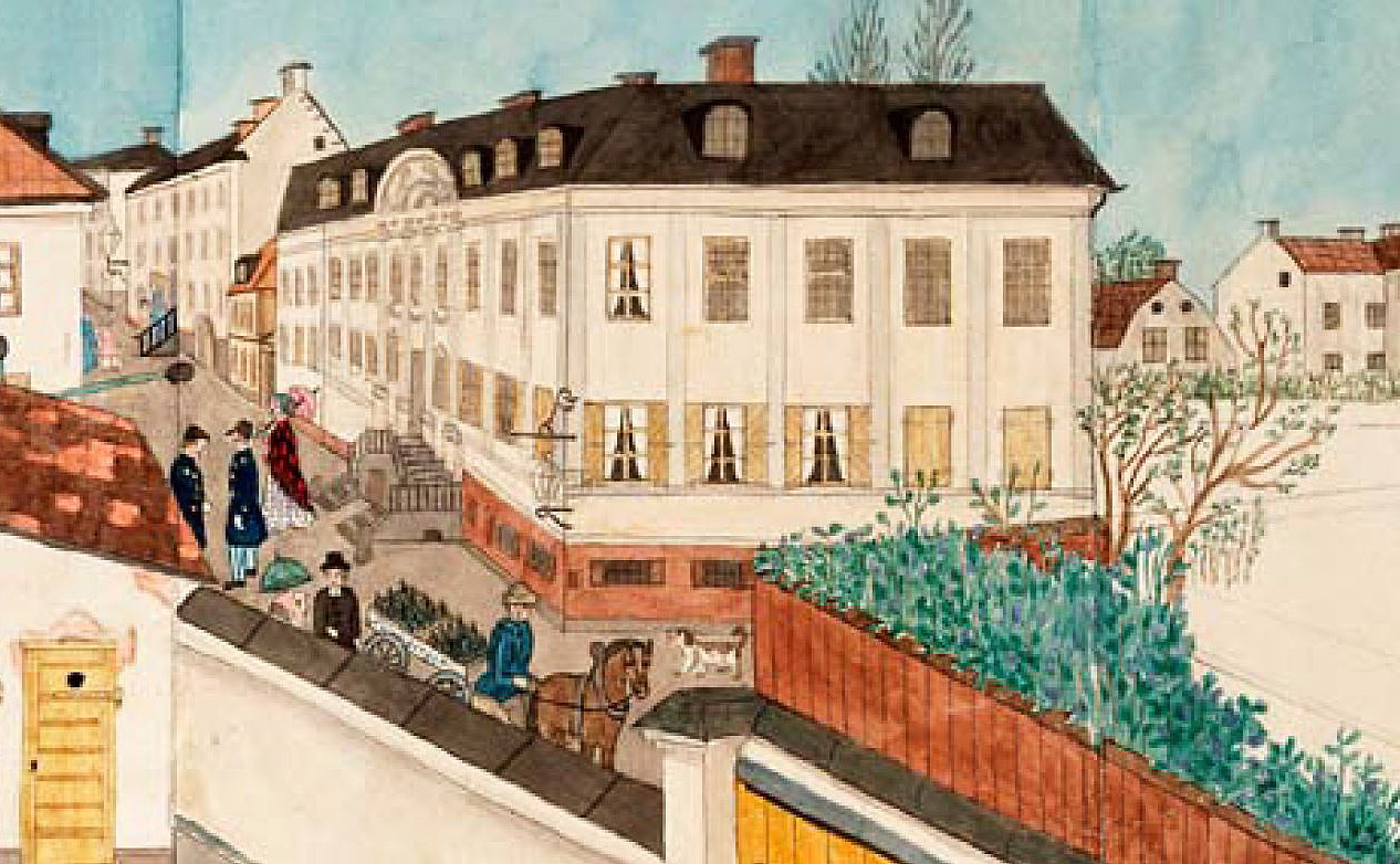 Van der Nootska palatset. Akvarell ”Utsikt från mina fönster i huset No 20 vid St. Paulsgatan” av Josabeth Sjöberg, SSM inv. nr. 11772. Bilden är beskuren.